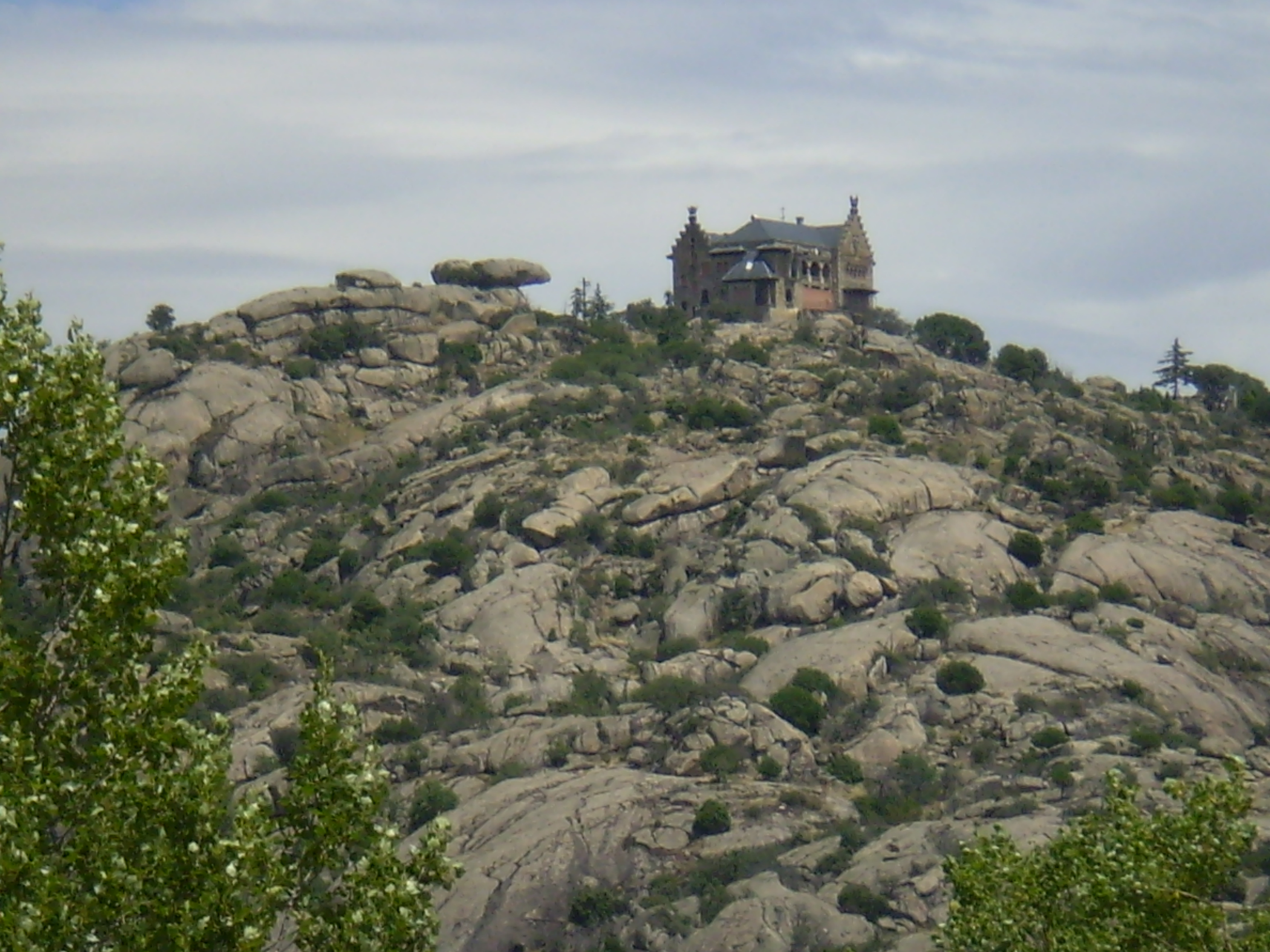 Palacio del Canto del Pico. Torrelodones, Madrid, Spain